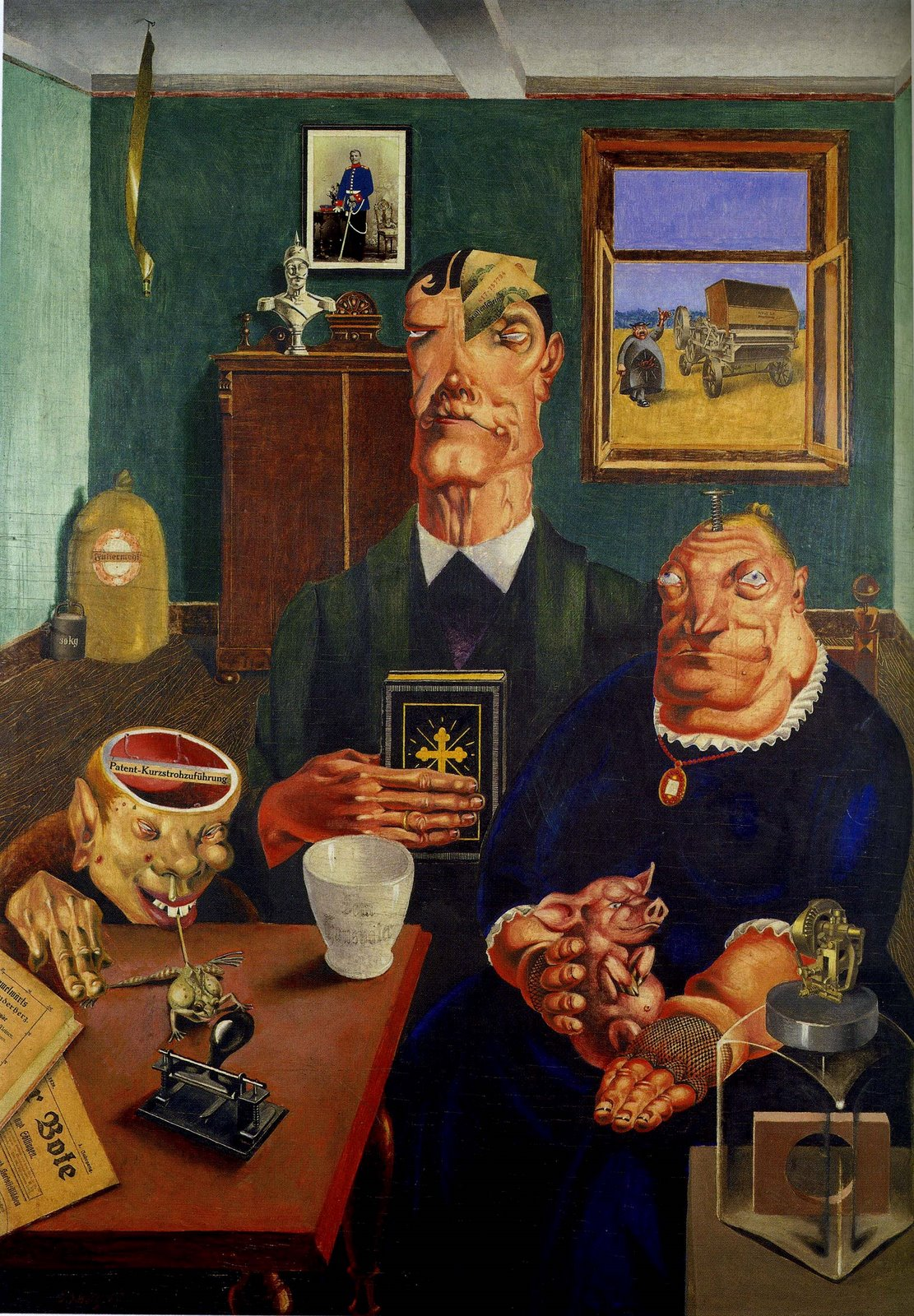 Industriebauern (1920). Картина Георга Шольца.